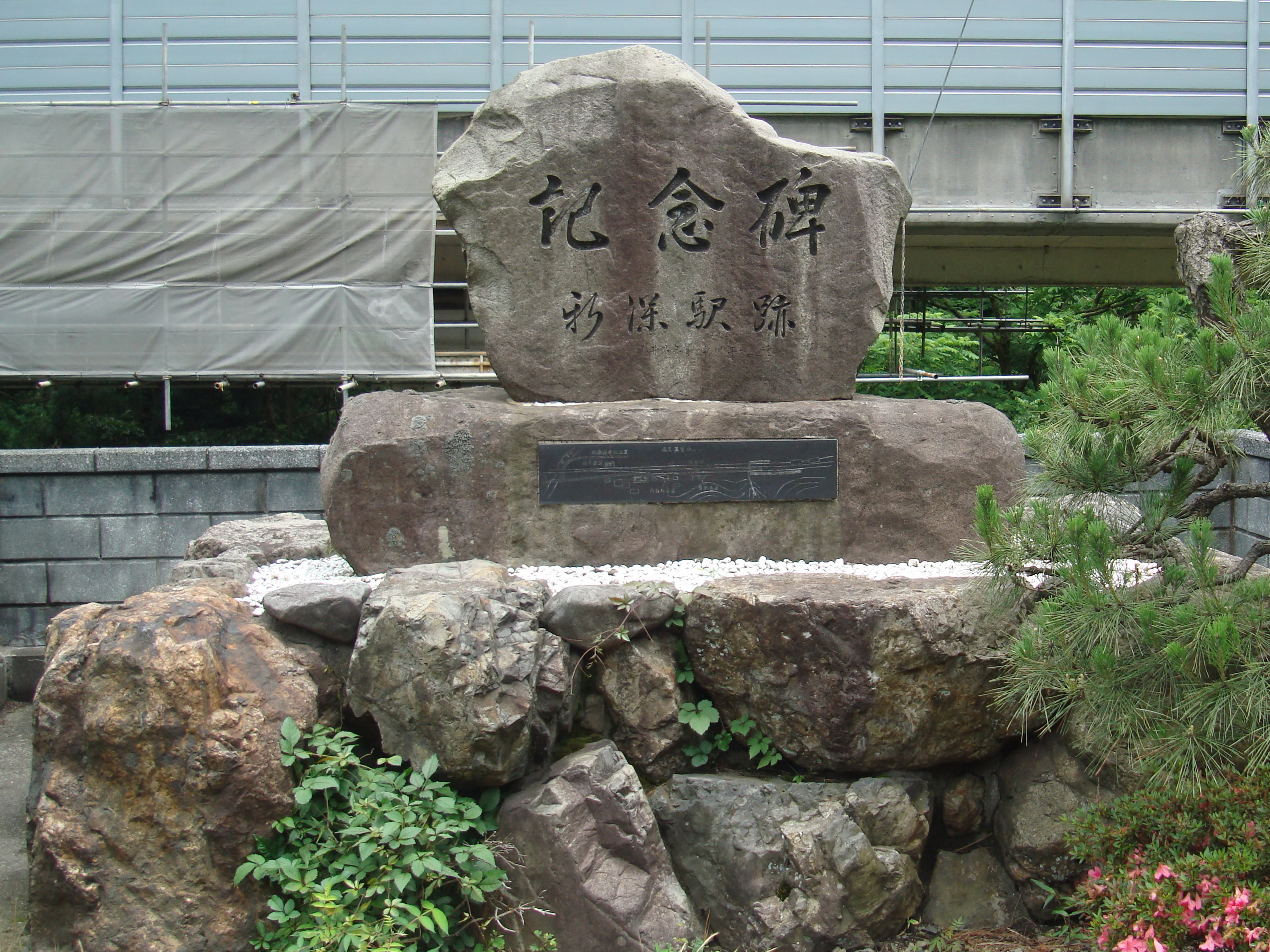 神保駅跡地の記念碑